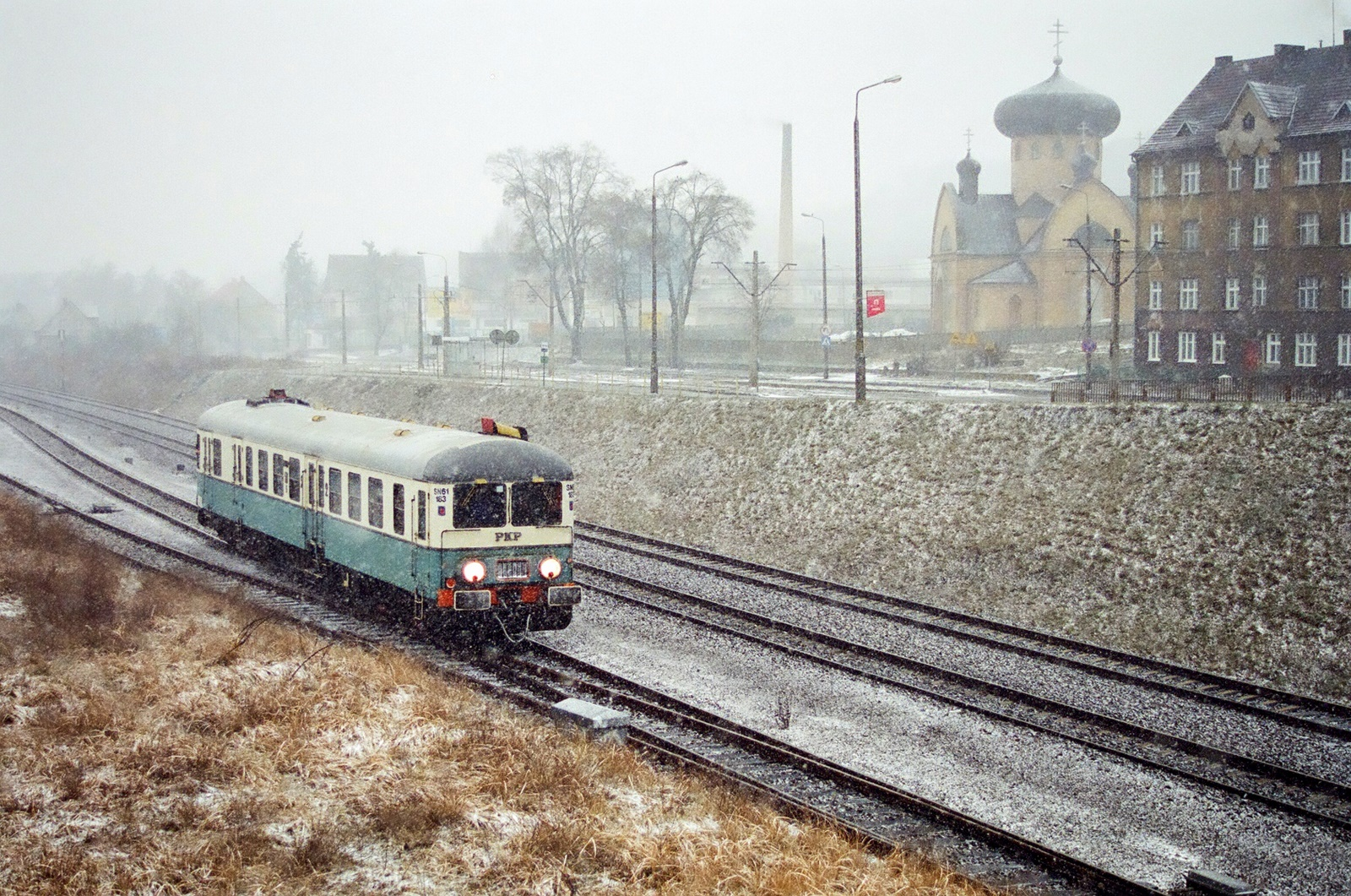 Linia kolejowa 203, odcinek stacja Gorzów Wlkp. - Gorzów Wlkp. Wieprzyce (Spalinowy wagon silnikowy SN 61 - 183)